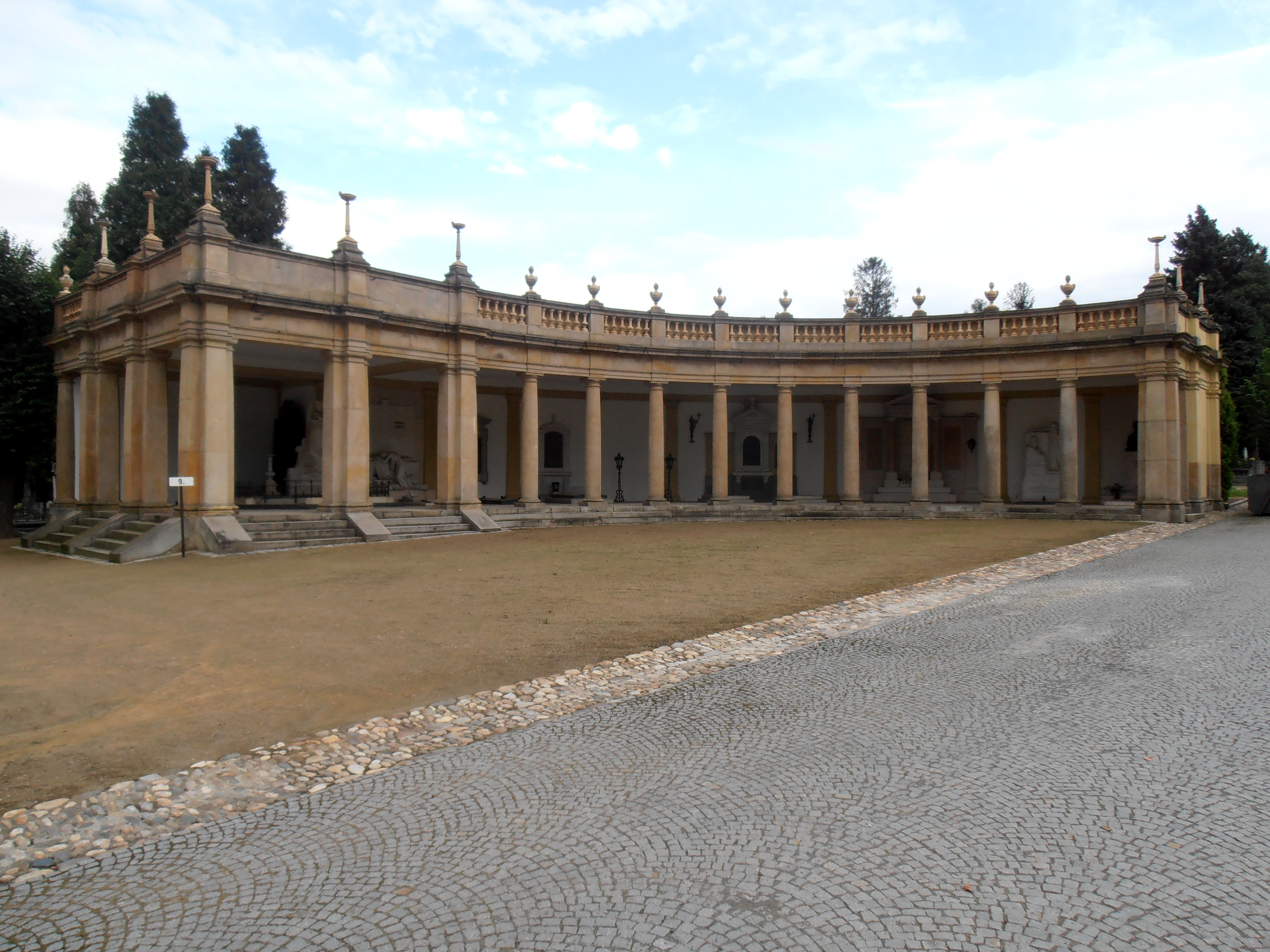 Kolumbarium, Otická, Opava-Předměstí, Opava.